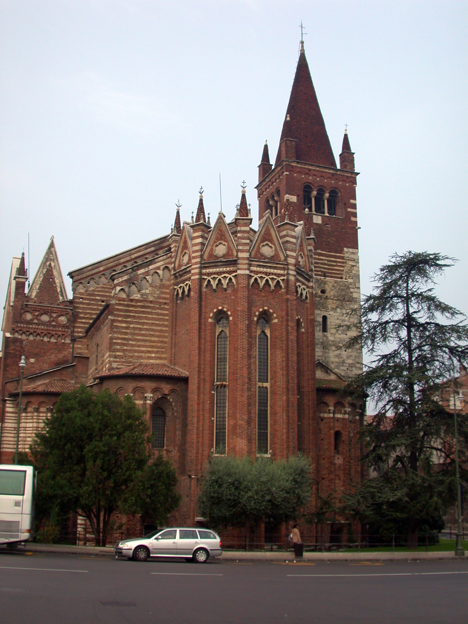 Verona, church of Santi Fermo e Rustico